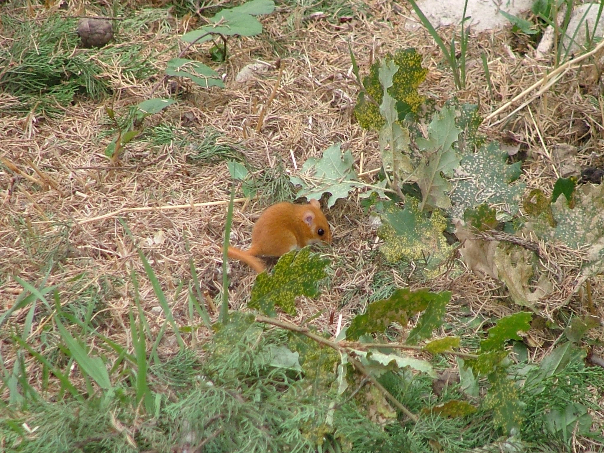 Muscardinus avellanarius, Moscardino, San Giorgio del Sannio , Località I Marzani (Benevento), Italia